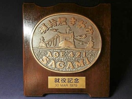 ＡＯＥ－４２１ 補給艦さがみ 就役記念盾